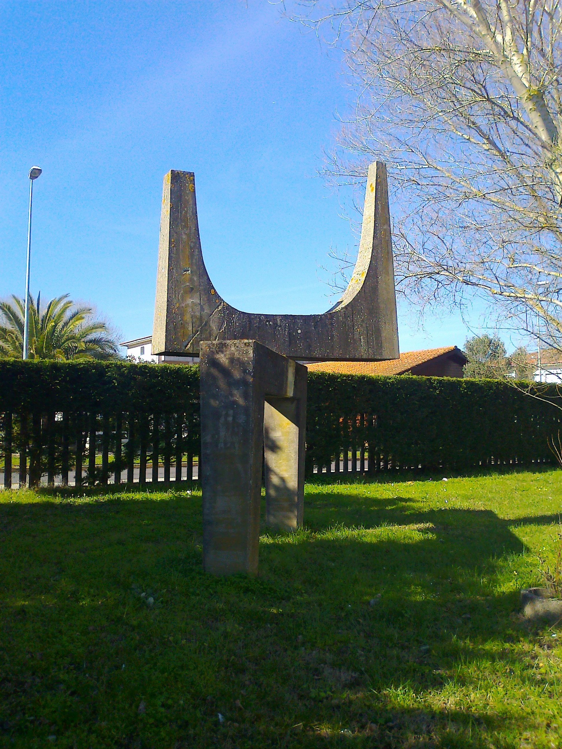 Leopoldo Novoa na Wikipedia